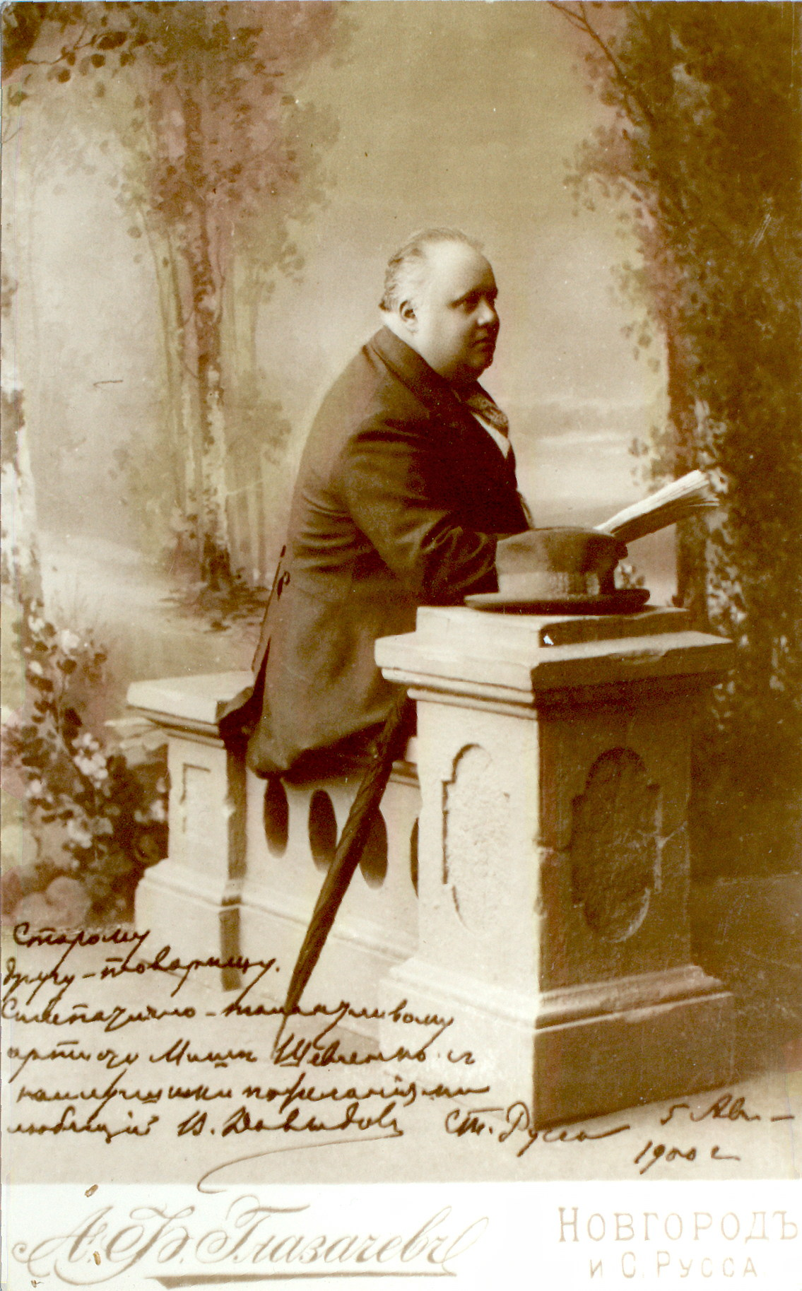 Владимир Николаевич Давыдов (7(19).1.1849, Новомиргород — 23.6.1925, Москва; настоящее имя и Фамилия — Иван Николаевич Горелов) — российский и советский актёр, театральный режиссёр, педагог, Народный артист Республики.